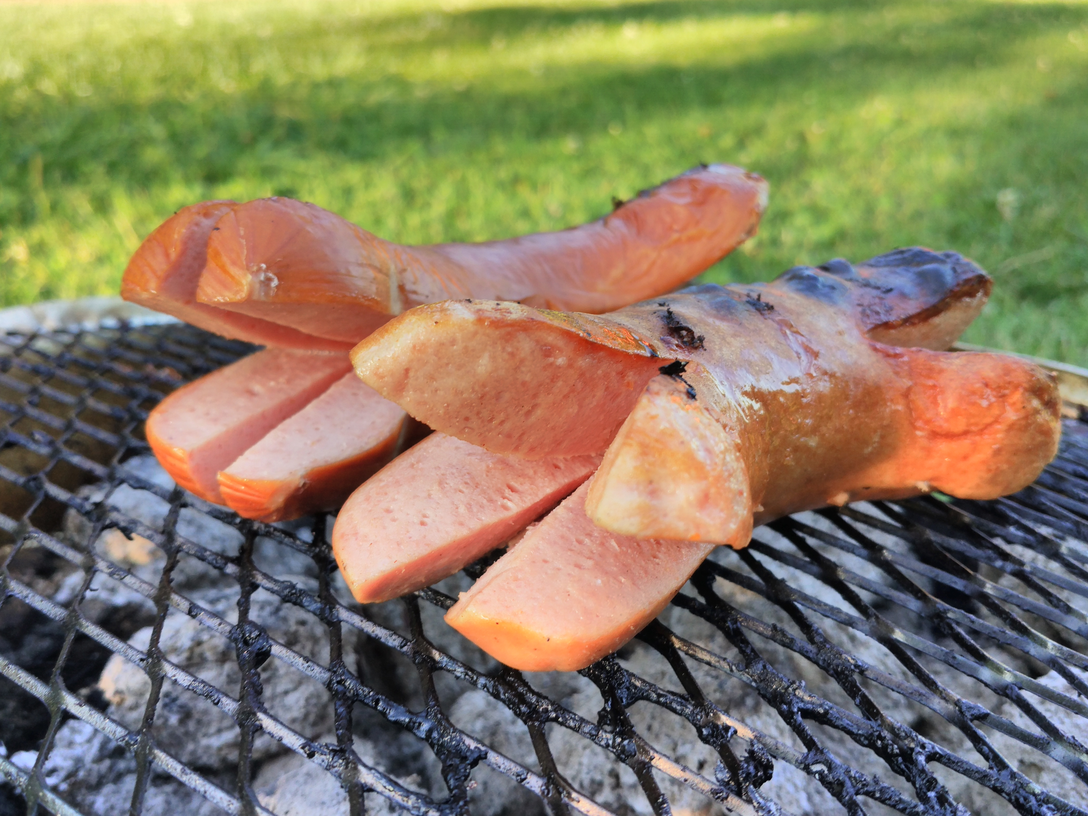 un cervelas suisse, avec la découpe en croix traditionnelle